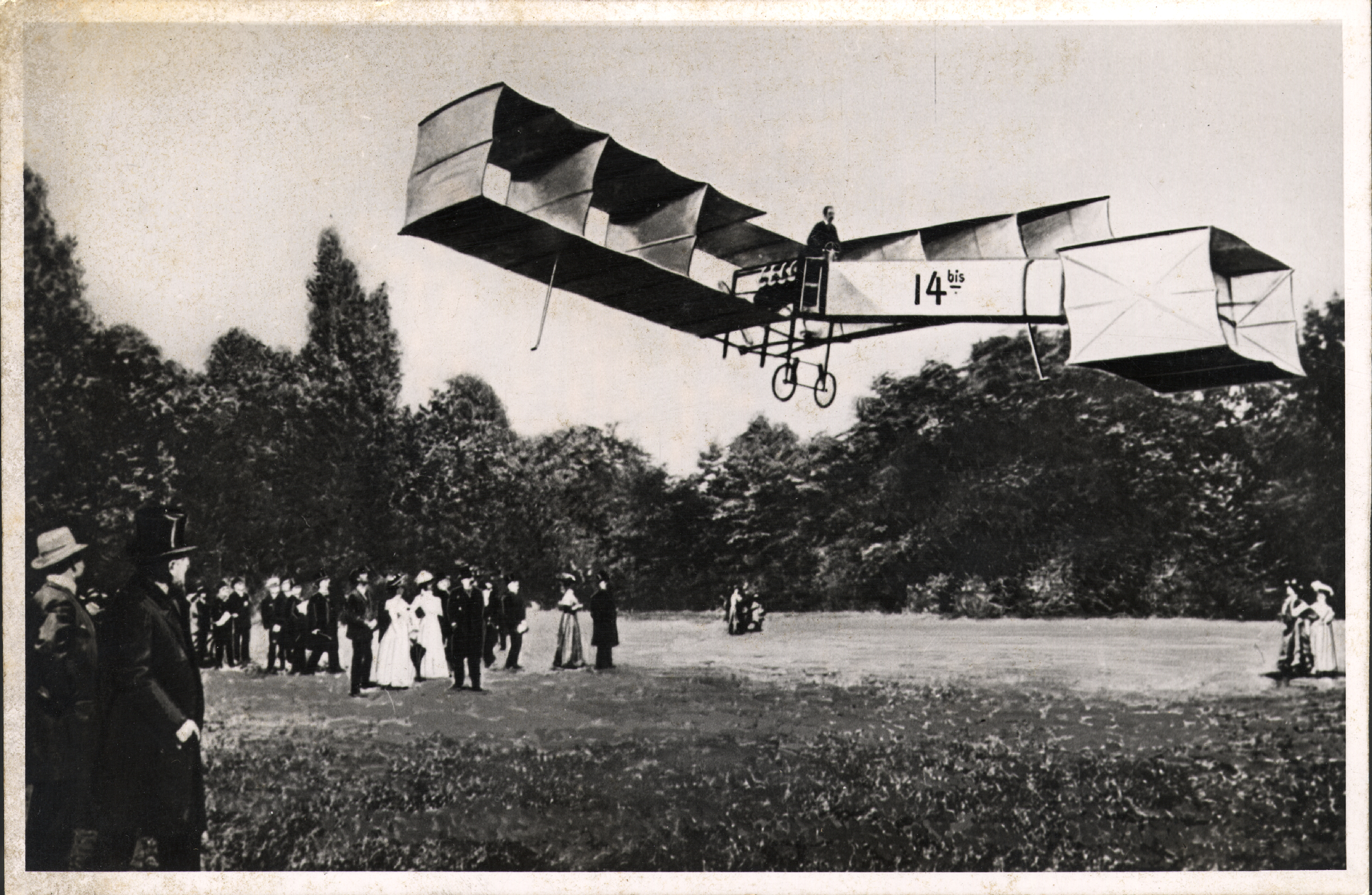 Obra que integra o acervo do Museu Paulista da USP. Coleção Alberto Santos Dumont.